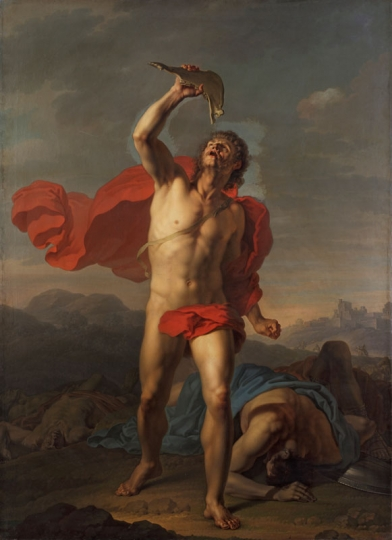 Чернов И.П. Самсон утоляет жажду из ослиной челюсти. 1800/ ГТГ